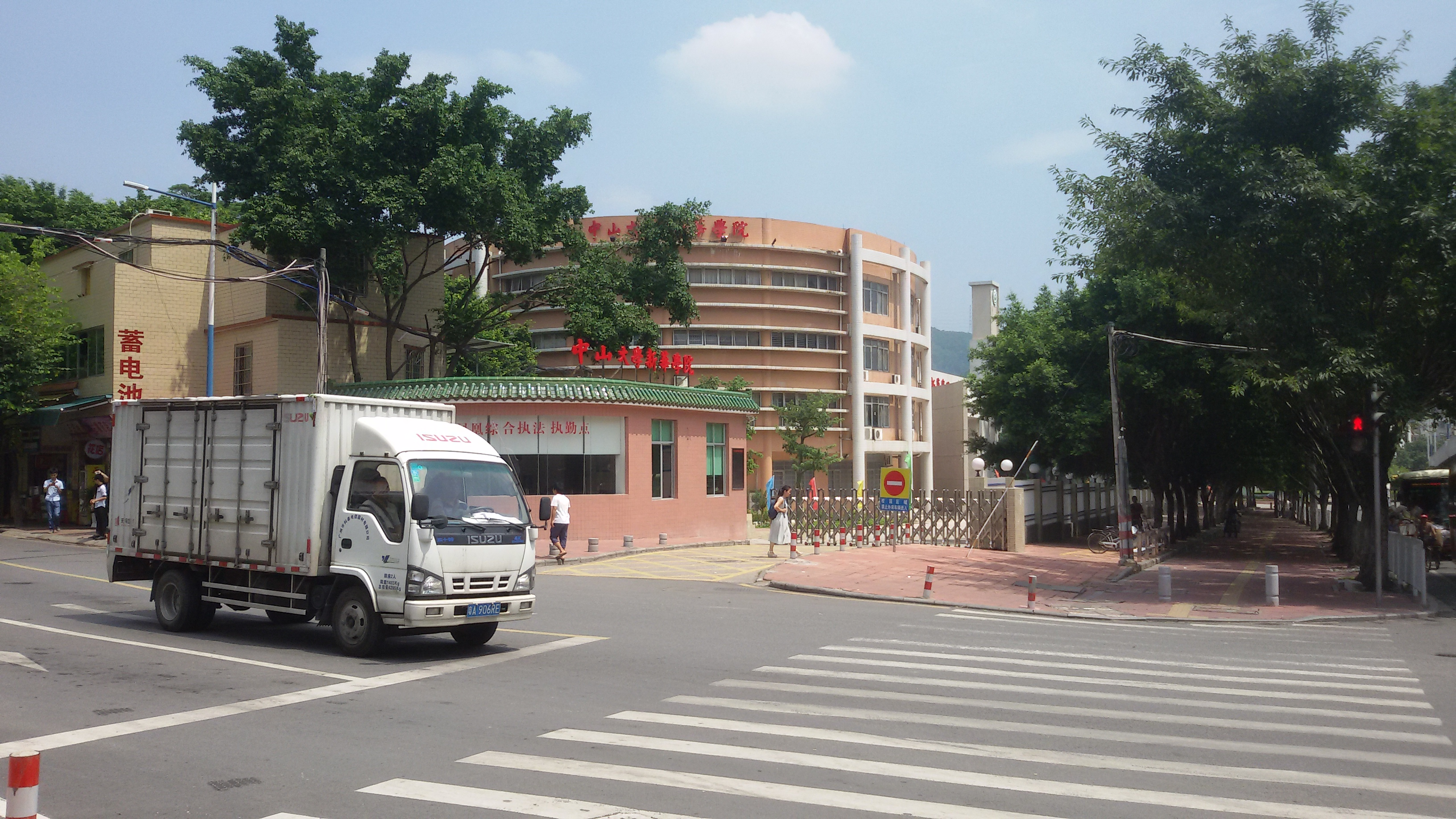 粵語: 中山大學新華學院嘅柯木塱校區